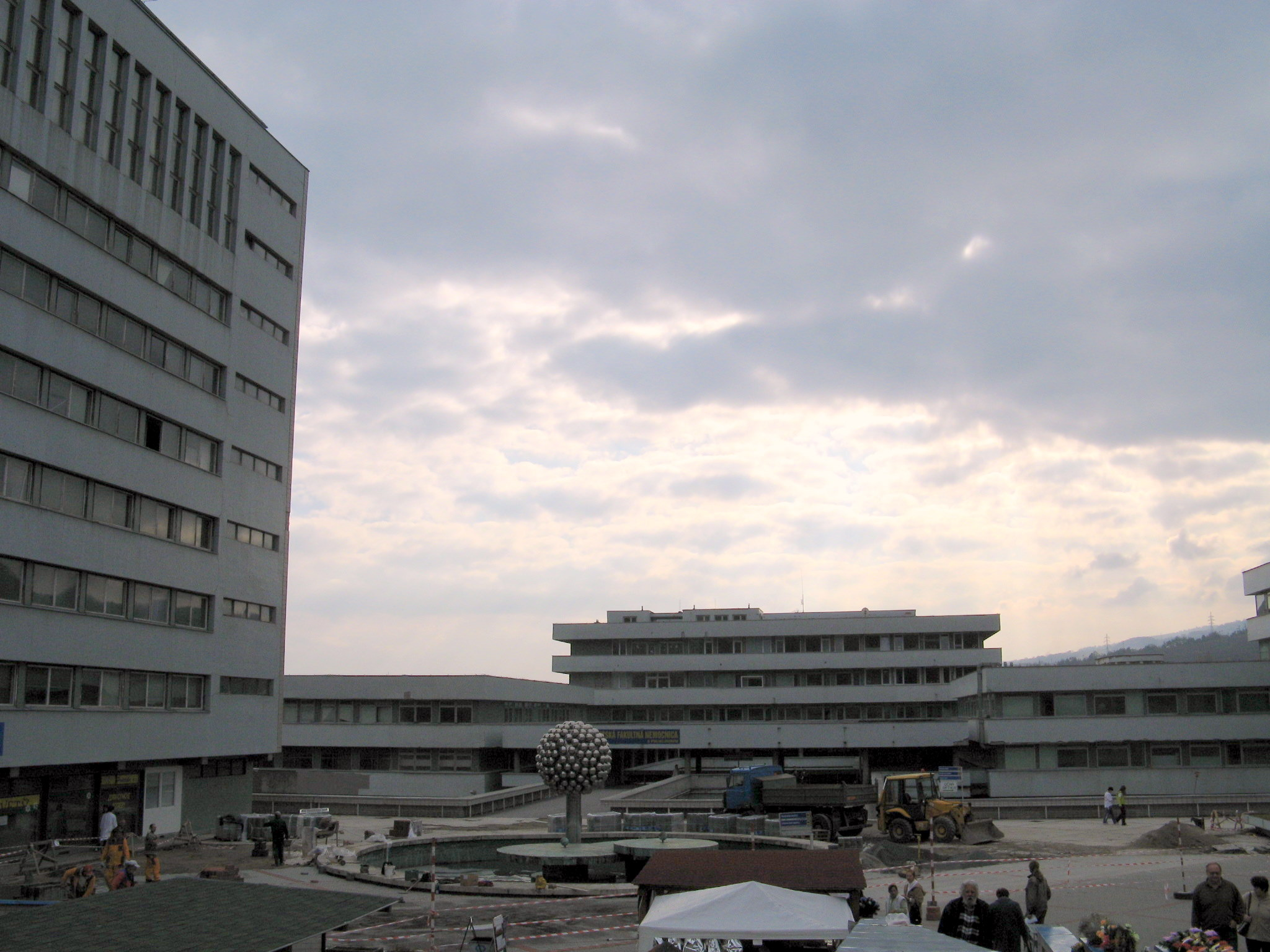 Rooseveltova nemocnica